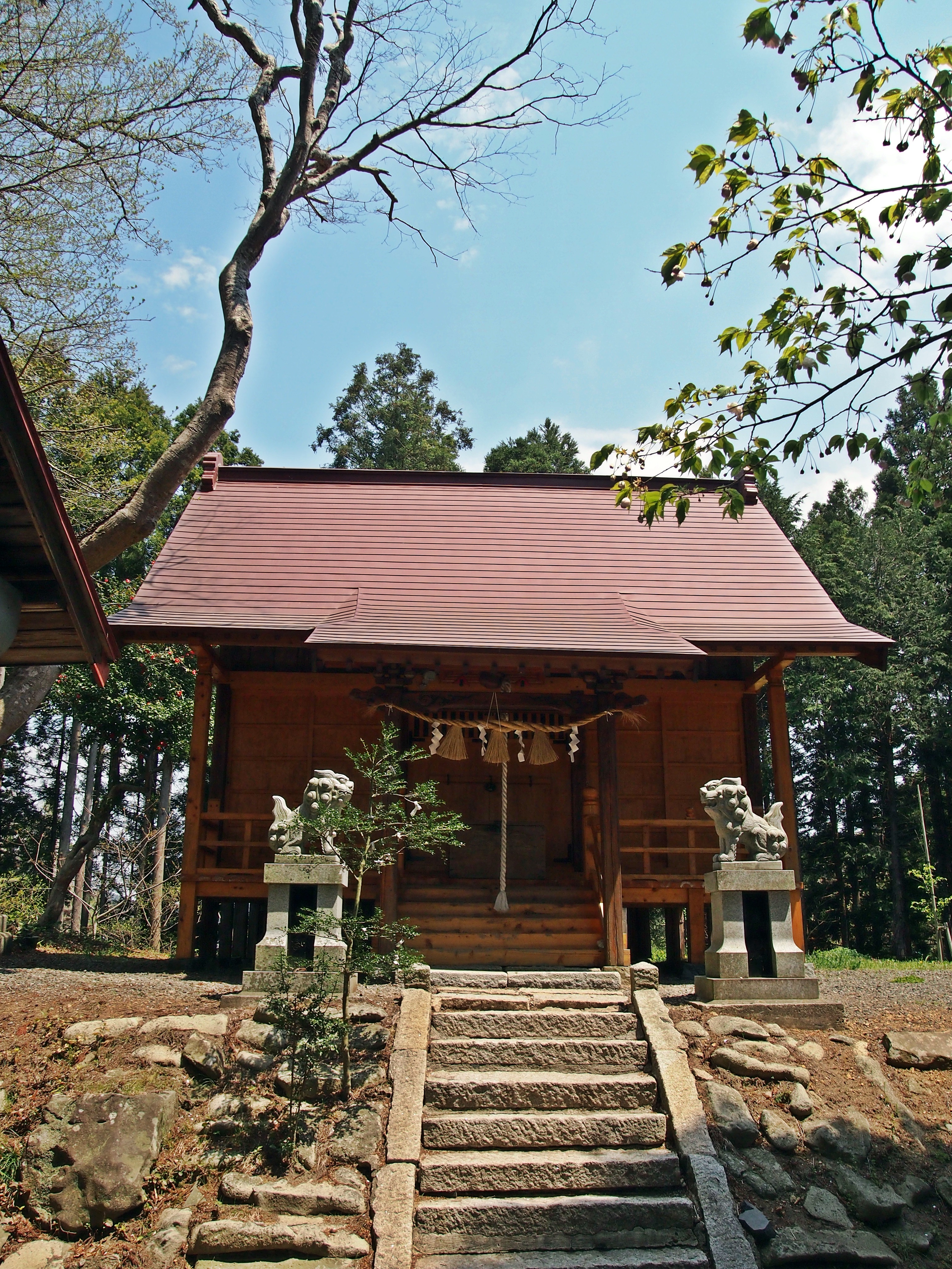 染殿神社拝殿